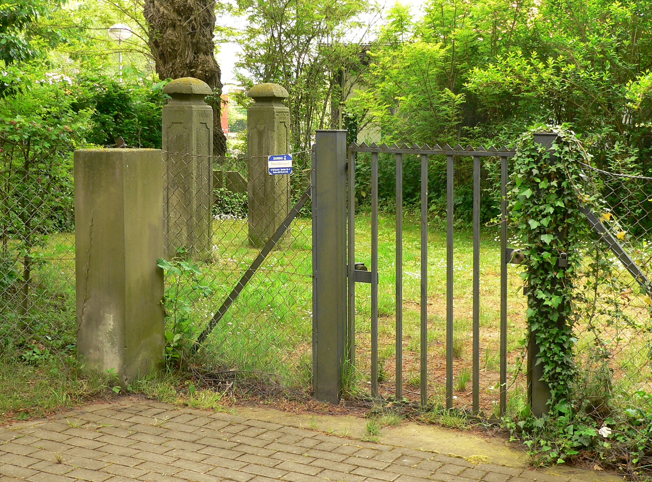 Jüdischer Friedhof (Coppenbrügge), Eingang